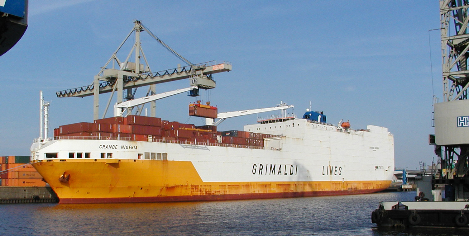 Das RoRo und Containerschiff „Grande Nigeria“ der Grimaldi Line